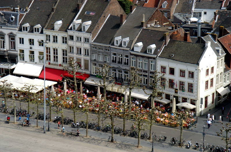 Vrijthof Maastricht